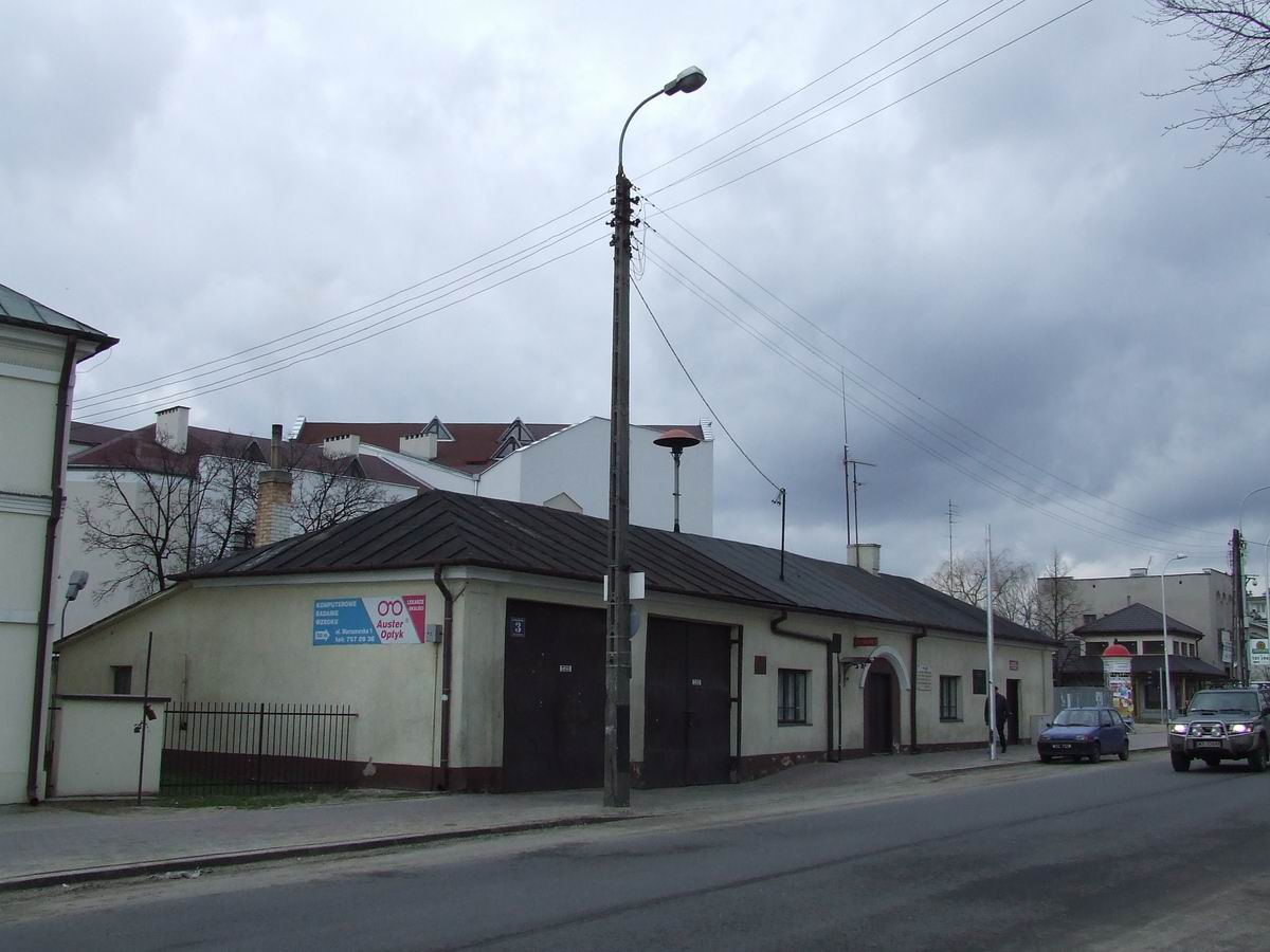 Piaseczno. Stara remiza strażacka.